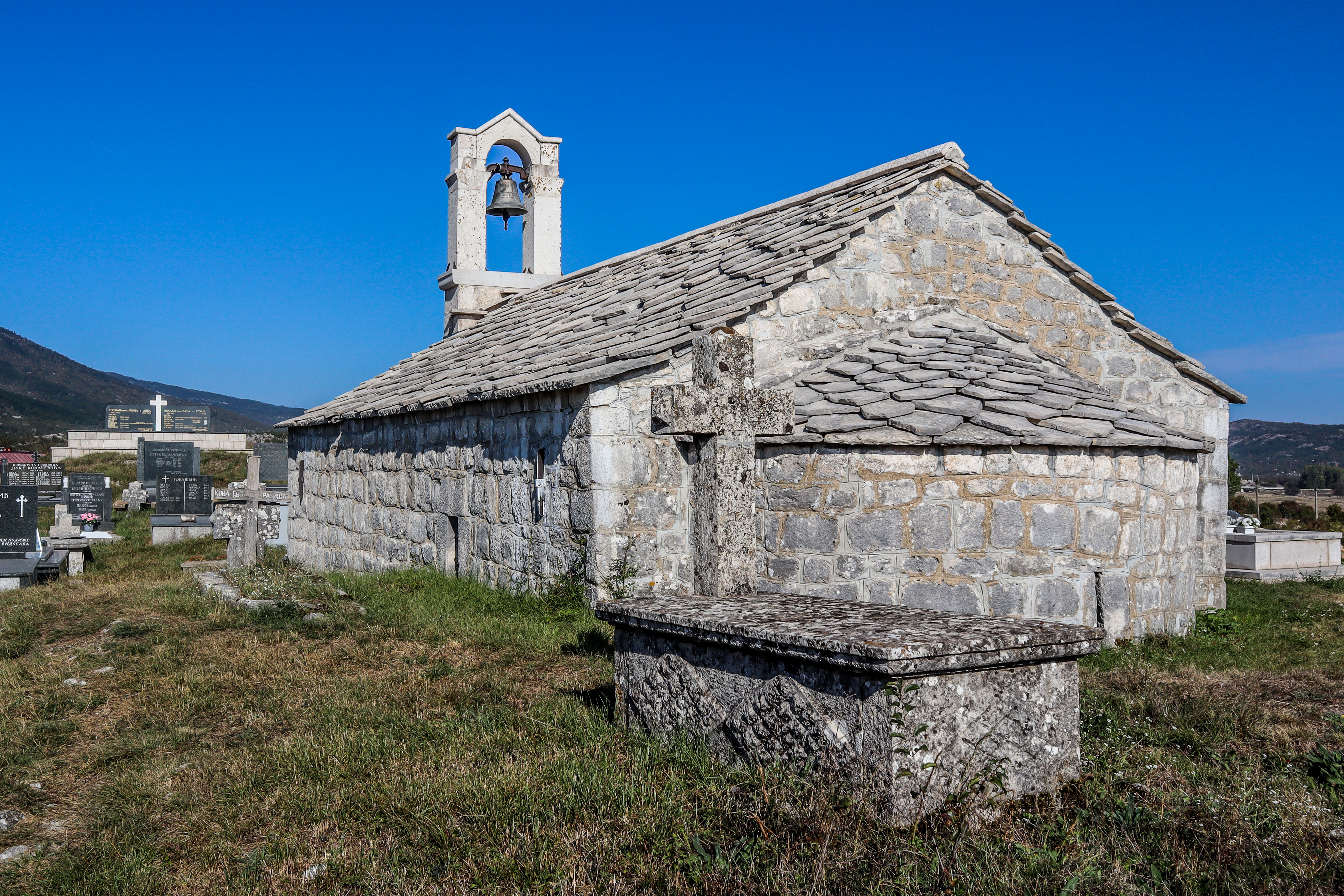 Crkva Svetog Nikole u selu Srđevići kod Gacka. Sagrađen je tokom srednjeg vijeka, a tačan datum izgradnje nije poznat. Predpostavlja se da je podignuta tokom 13 vijeka, i spada u najstarije hramove na području opštine. This image was uploaded as part of Trace of Soul 2018.